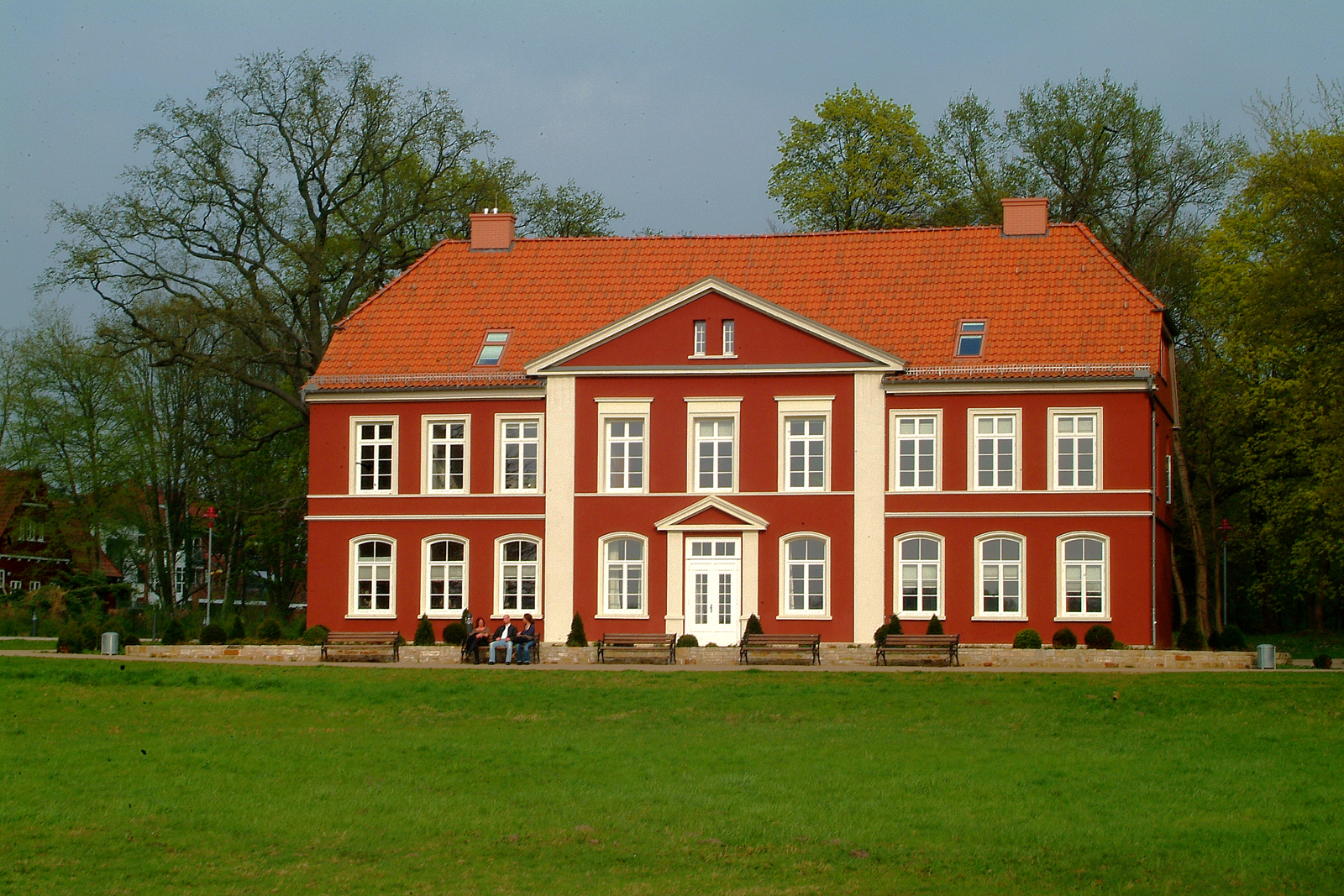 Die Thaersche Villa, gesehen von den Dammaschwiesen in Celle